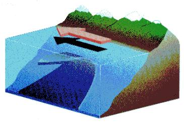 שרטוט "עליית מי עומק" מאתר NOAA taken from NOAA site.